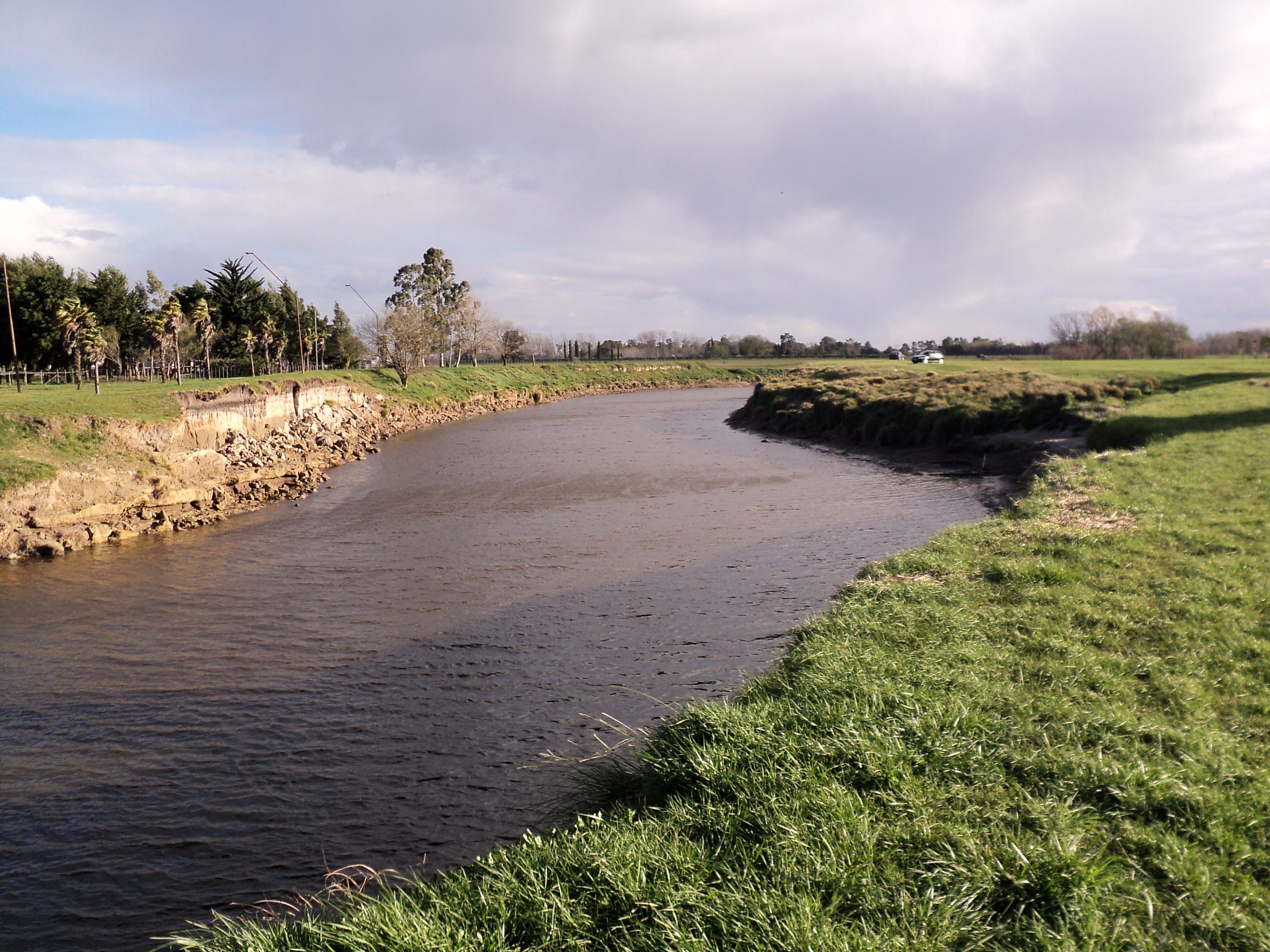 el arroyo tapalque en las afueras de Olavarria